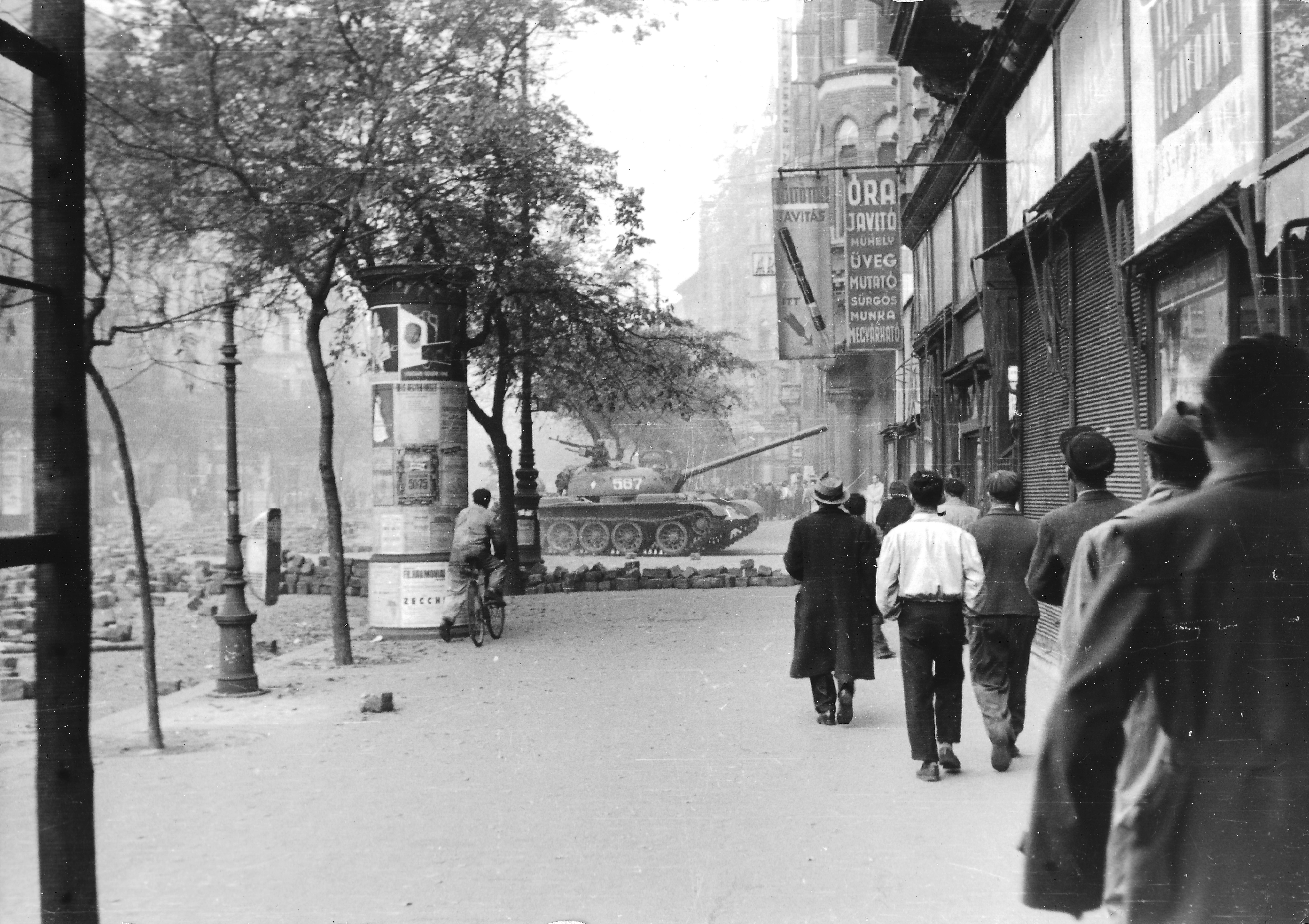 Erzsébet (Lenin) körút, jobbra a Barcsay utca torkolata. Location: Hungary, Budapest VII. Tags: trash can, revolution, clockmaker, barricade, ad pillar, bicycle, Budapest Title: Erzsébet (Lenin) körút, jobbra a Barcsay utca torkolata.